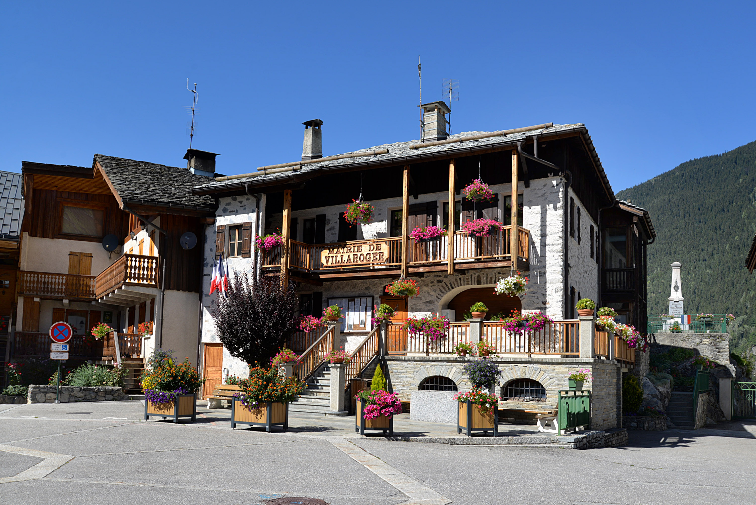 Villaroger (Savoie)